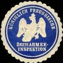 Dienstsiegel der Königlich preußischen 3. Armee-Inspektion